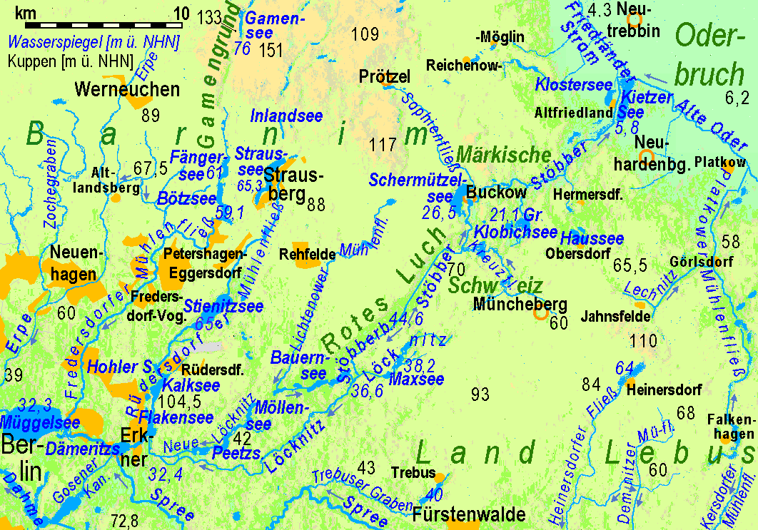 Parts of Barnim region between Berlin and the Oderbruch region: Rotes Luch wetland Märkische Schweiz Fredersdorfer Mühlenfließ Southernmost part of Gamengrund rift Platkower Mühlenfließ